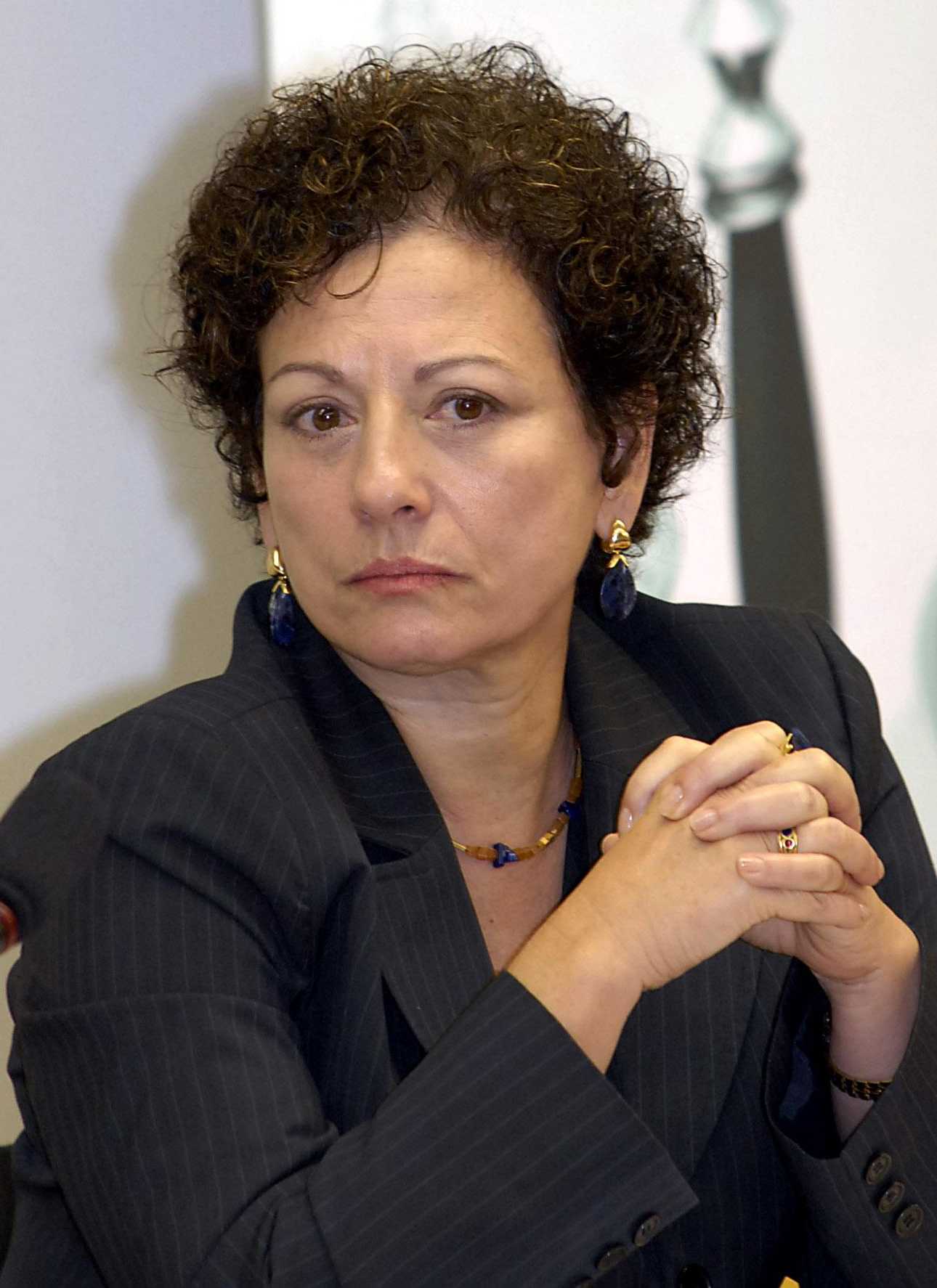 A ministra da Secretaria Especial de Politicas para as Mulheres, Nilcéia Freire, durante o seminário A Mulher na Reforma Política, na Comissão de Seguridade Social e Família, da Câmara dos Deputados.